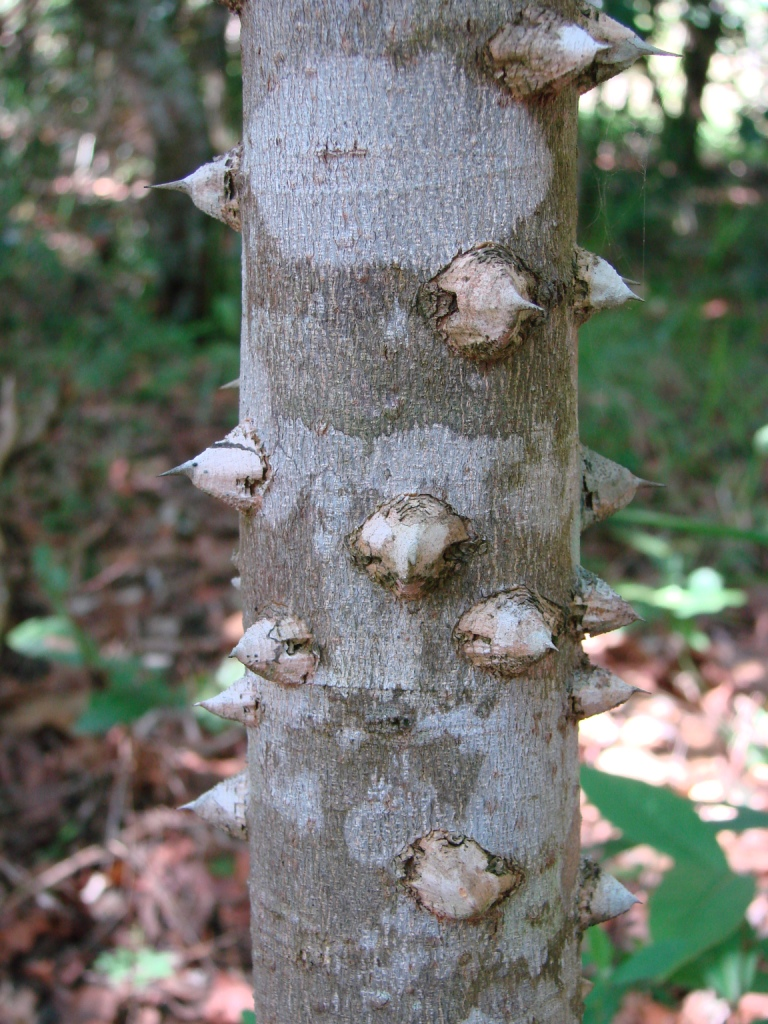 Zanthoxylum rhoifolium - RUTACEAE Jardim Botânico de Brasília - Distrito Federal - Brasil.